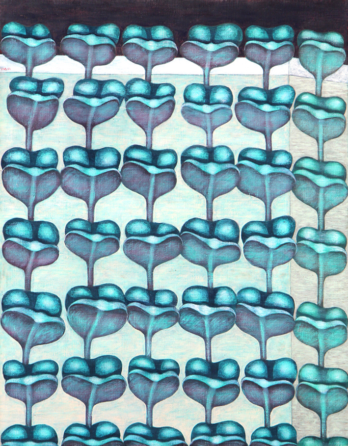 Hermann Waldenburg, Pflanzengitter, 1968, Tempera und Öl auf Leinen, 76 x 59 cm